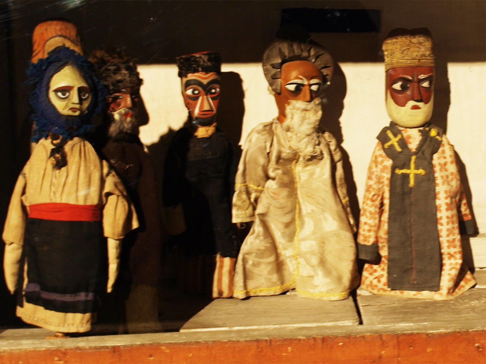 Ляльки Межигірського лялькового театру. Дерево, фарби, різблення. Музей театрального, музичного та кіномистецтва України